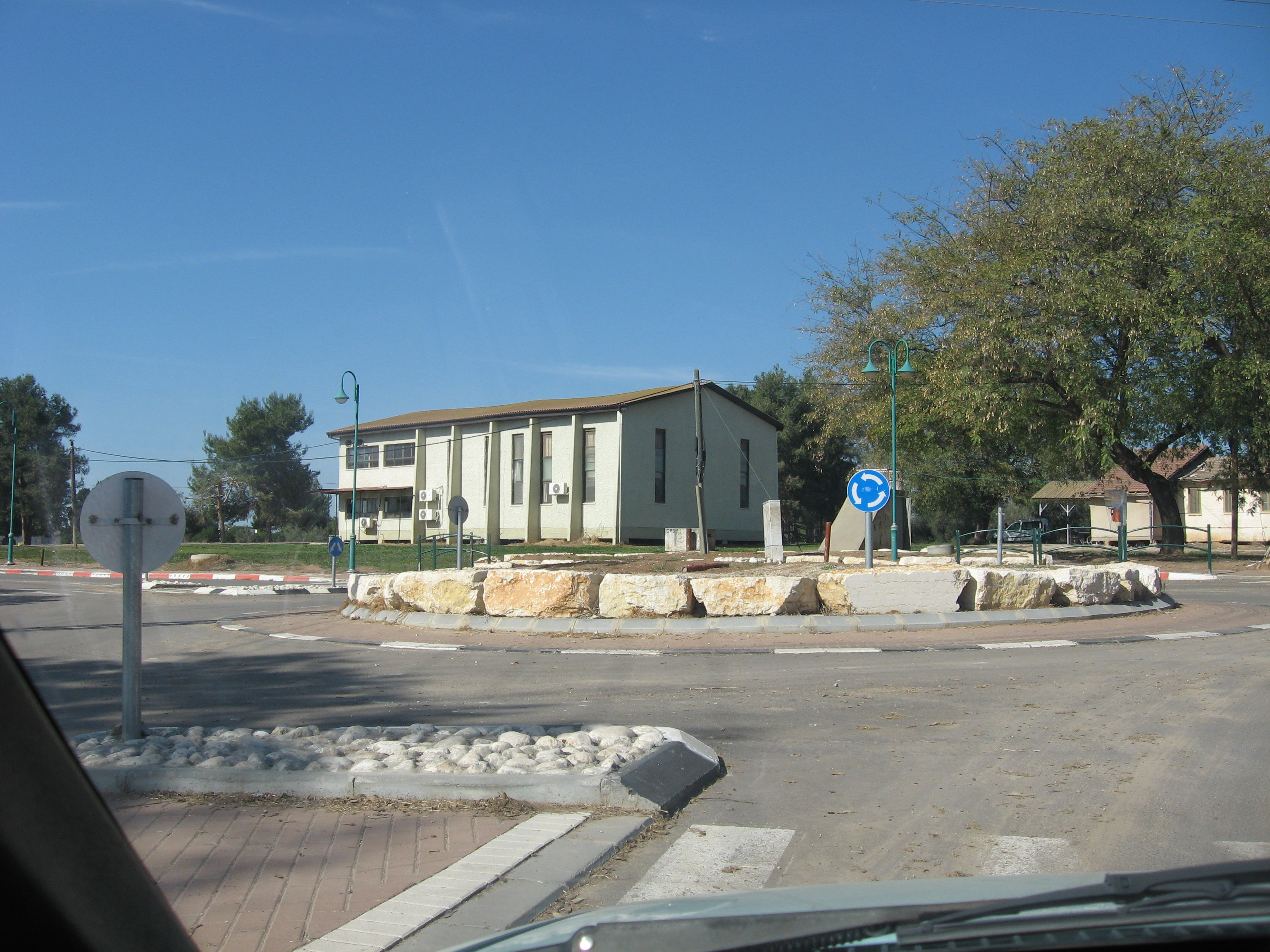 מרכז מושב קוממיות